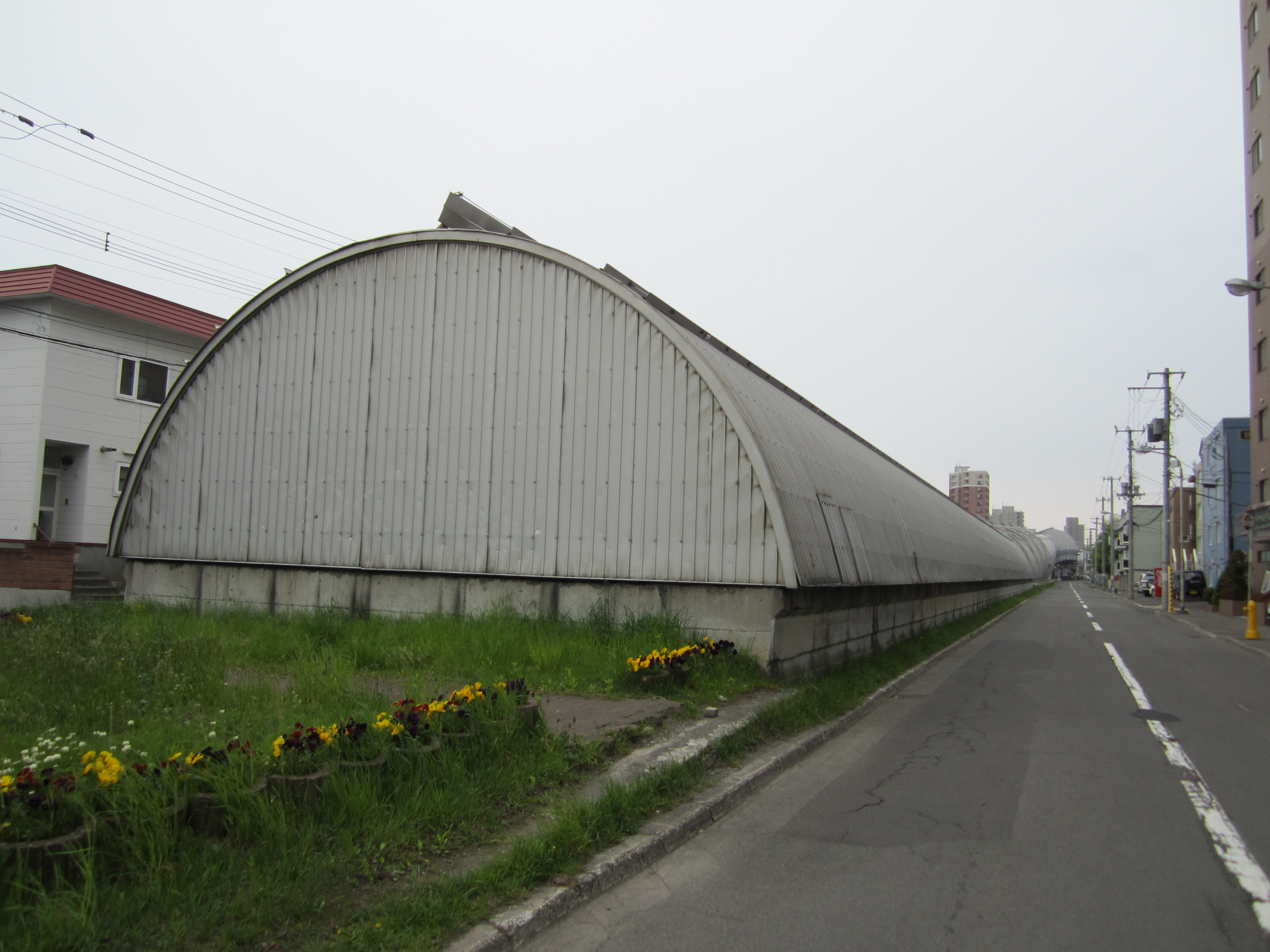 札幌市営地下鉄南北線の地下地上接続部（2012年5月）